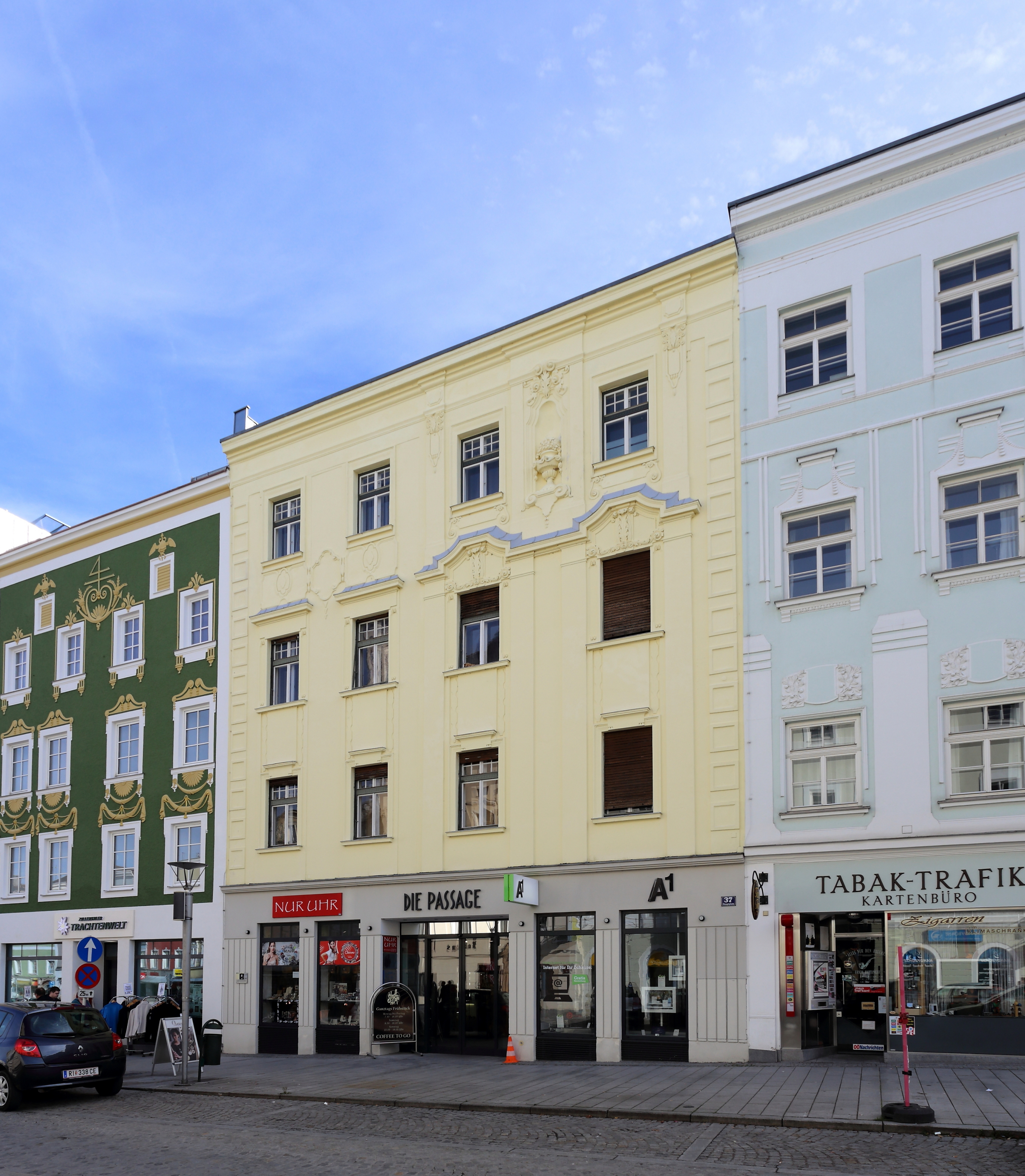 Bürgerhaus Hauptplatz 37 in der oberösterreichischen Bezirkshauptstadt Ried im Innkreis.